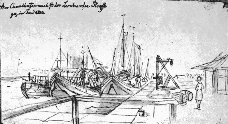 "Am Canalhafen naechst der Leonharder Straße", Bleistiftzeichnung (Scan aus dem Buch RHEIN-MAIN-DONAU. DIE GESCHICHTE EINER IDEE IN BILDERN. Heinz Zirnbauer. GAA-Verlag, Nürnberg 1962)